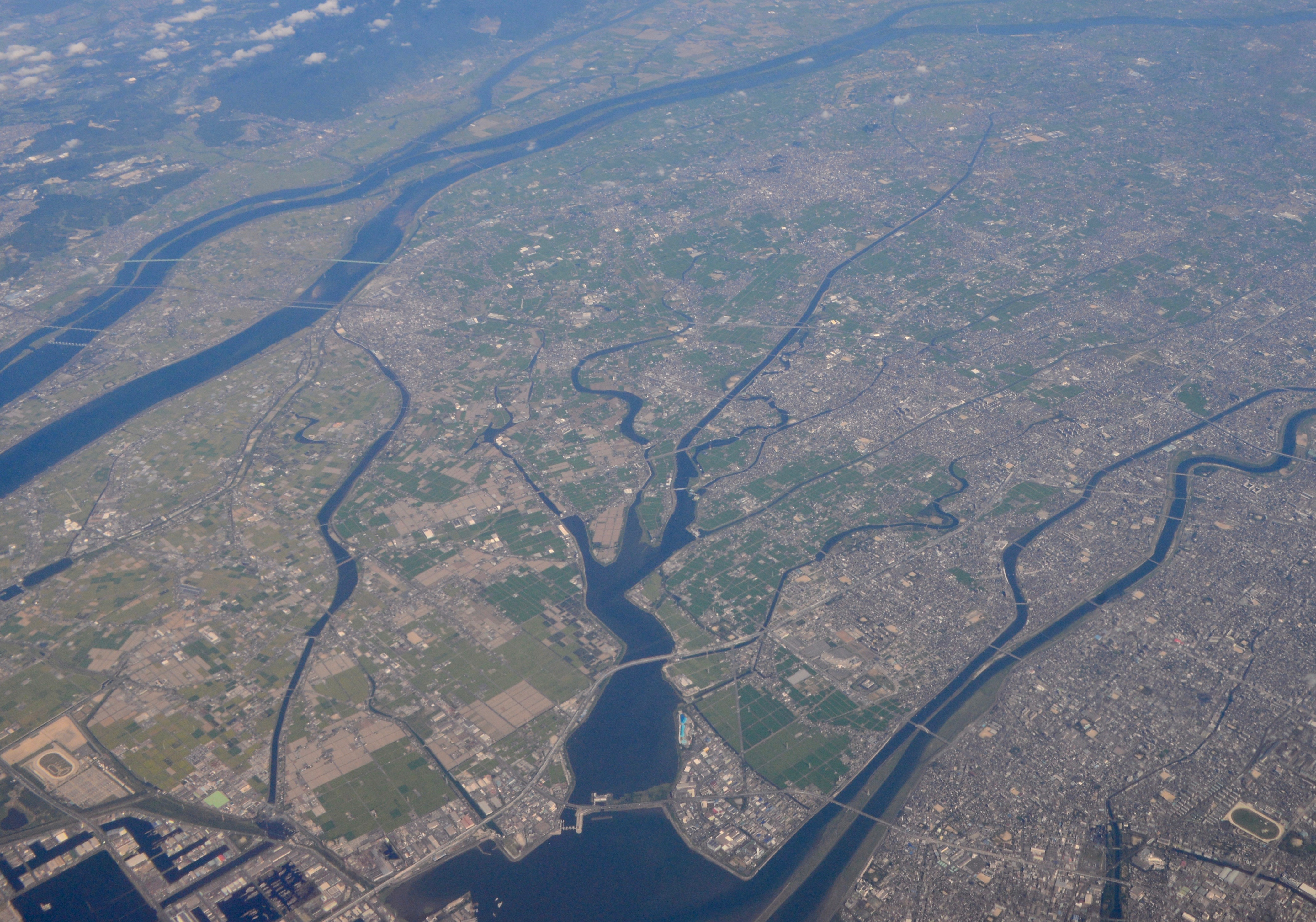 愛知県の日光川